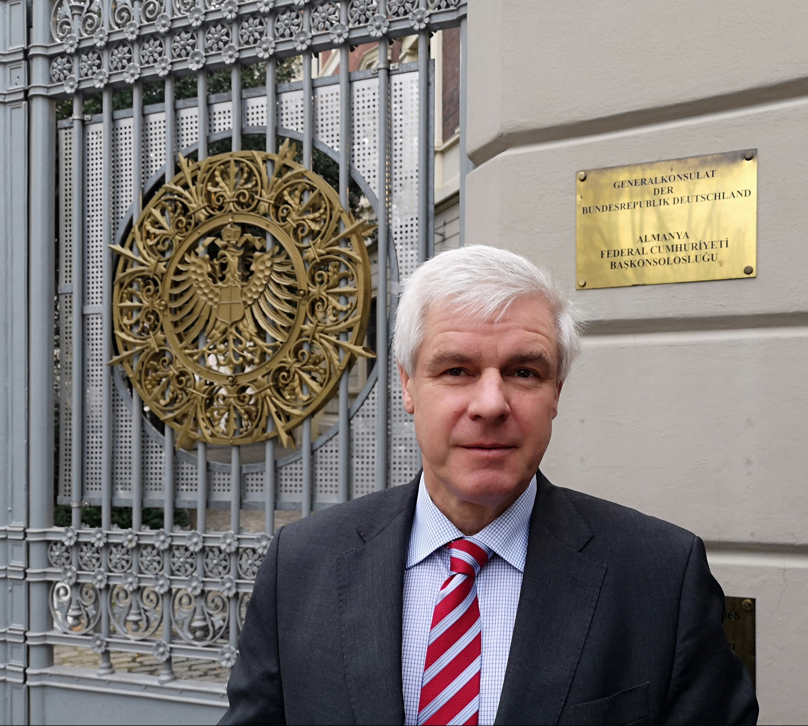 Generalkonsul Michael Reiffenstuel vor dem Tor der ehem. Deutschen Botschaft in Konstantinopel